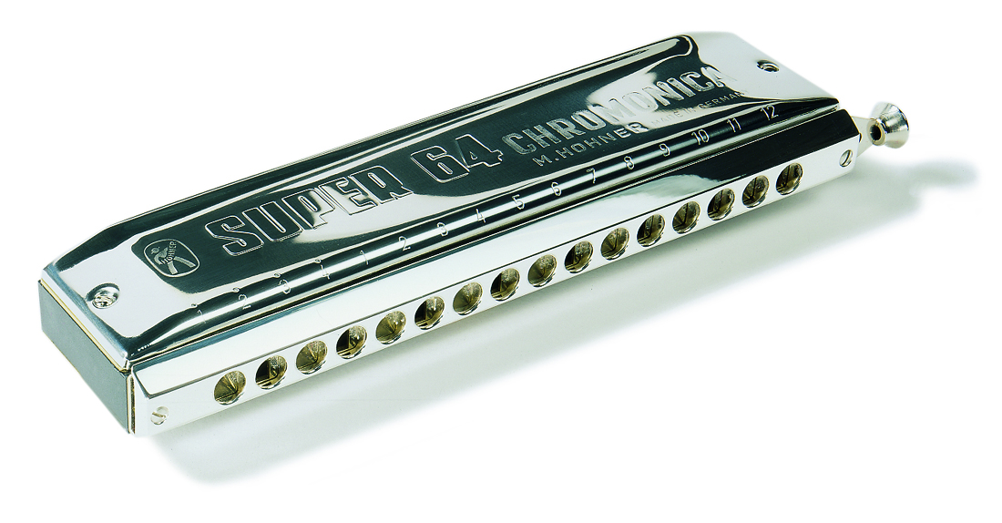 Chromatische Mundharmonika Super 64 mit 4 Oktaven Tonumfang (c-d')